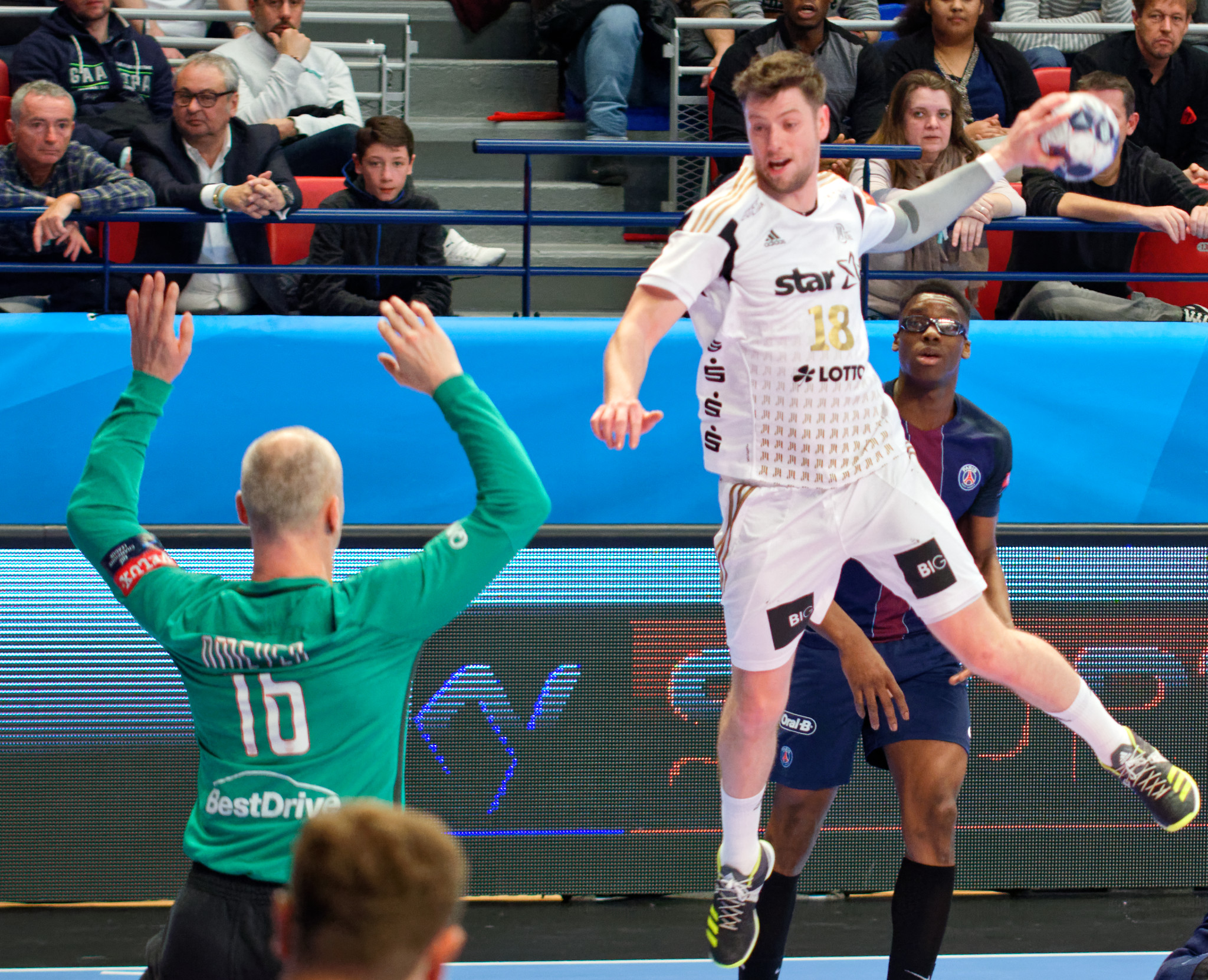 Rencontre de phase de groupe de la ligue des champions 2016-17 entre le PSG et le THW Kiel. A Coubertin, le 12 mars 2017.